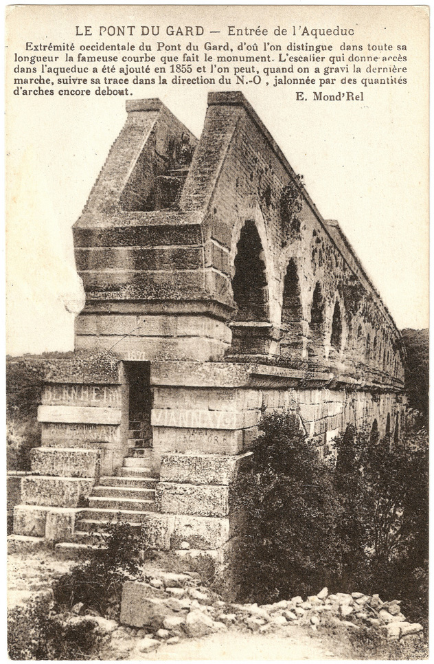 Carte postale du Pont du Gard